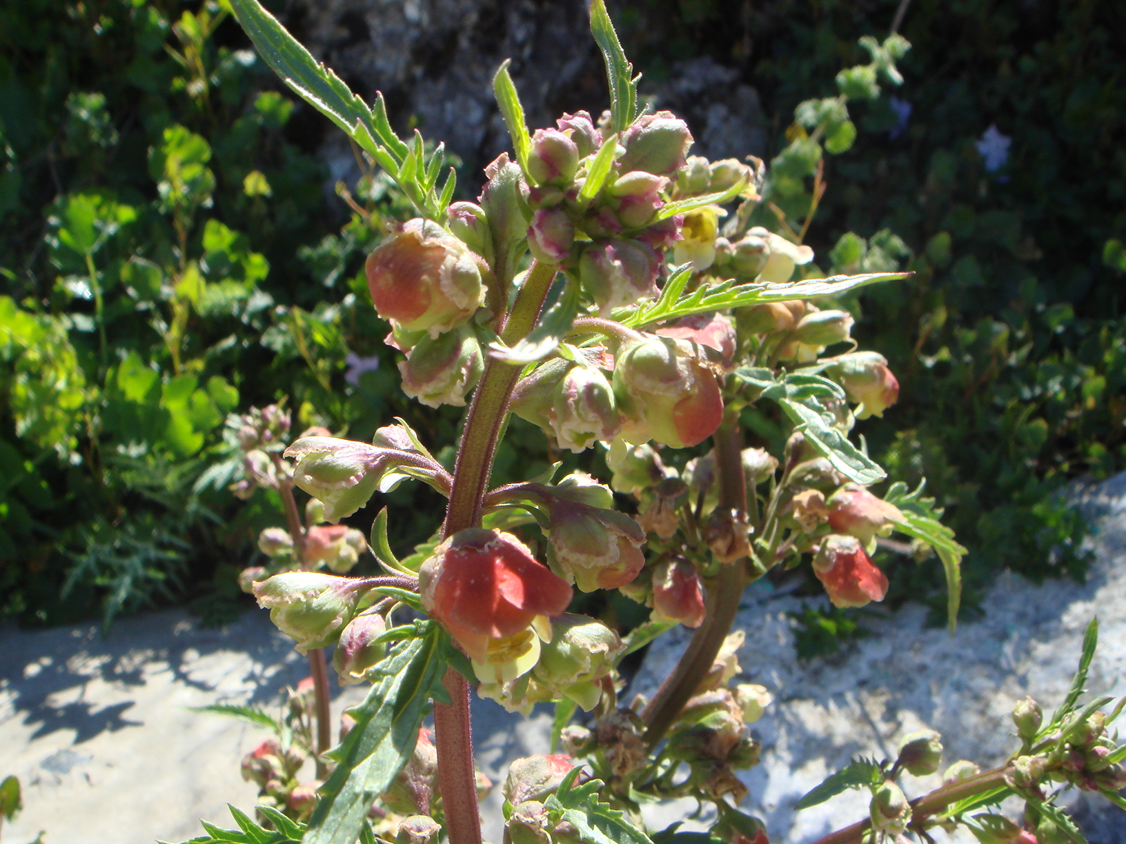 Scrophularia sambucifolia, Cádiz, España